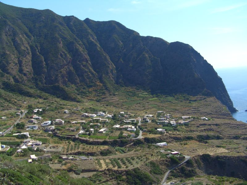 Malfa (Salina, Sicilia, Italia)